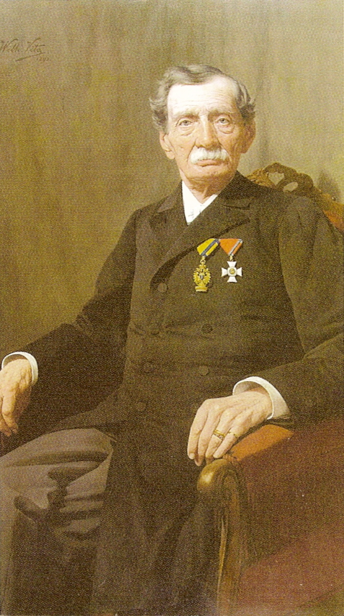 Viktor Drouot - Bürgermeister von Linz 1867-1873.